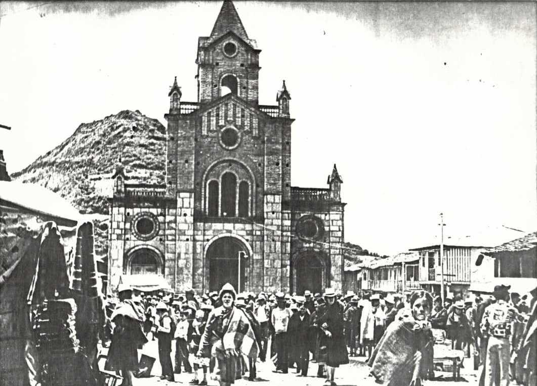 Pucará antiguo